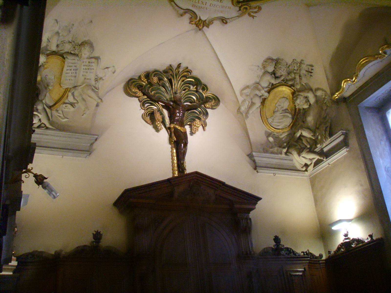 Chiesa di san gaetano, sagrestia, carlo marcellini, papa paolo IV, stucco 1702 e crocifisso della scula del giambologna